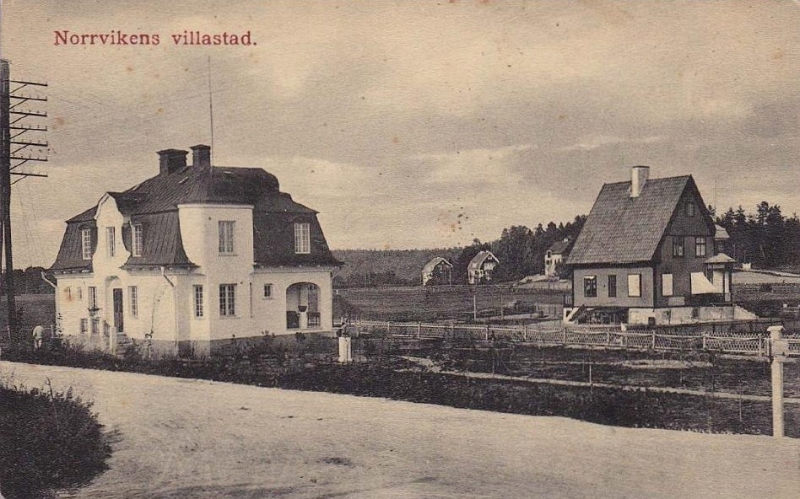 Norrvikens villastad sollentuna vykort